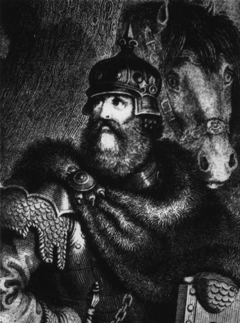 Беларуская (тарашкевіца): Уяўны партрэт вялікага князя Кейстута (Kiejstut)